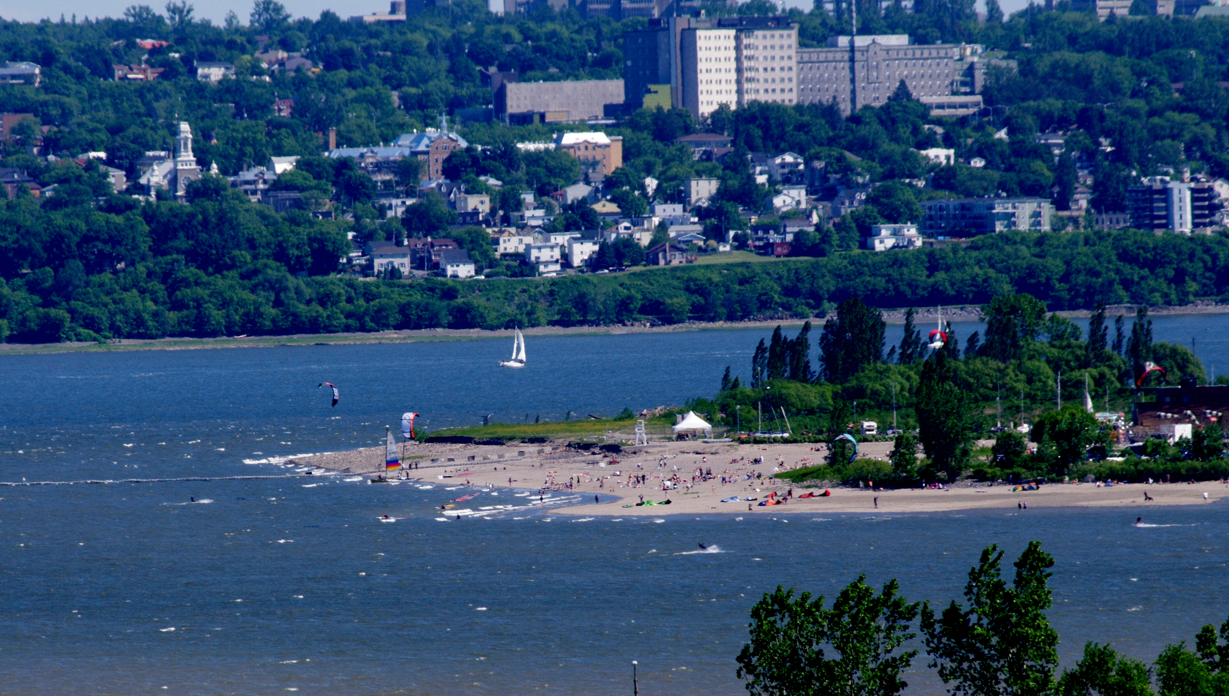 Image de la ville de Québec provenant du concours Wikipédia prend Québec.